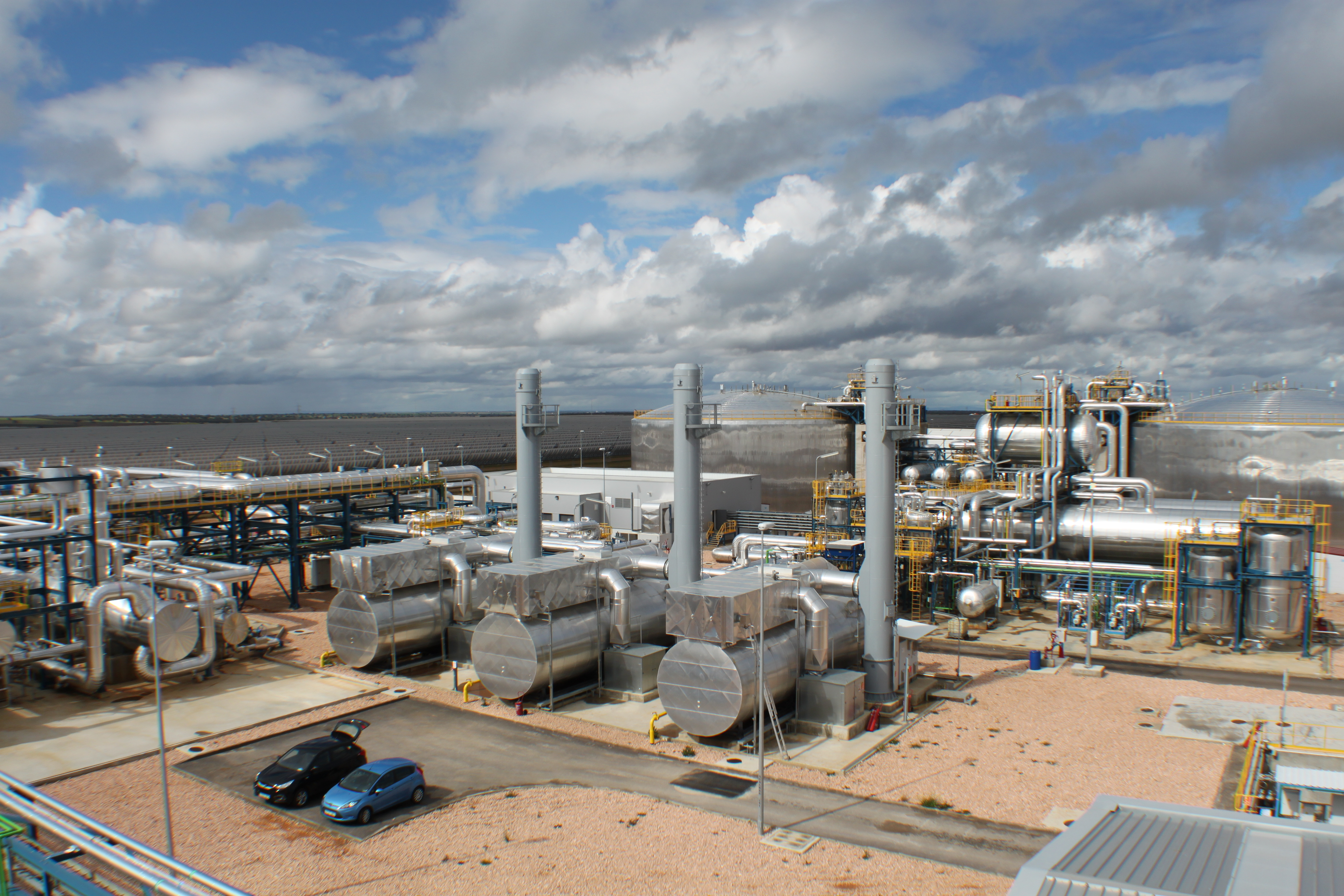 Anlage in Spanien